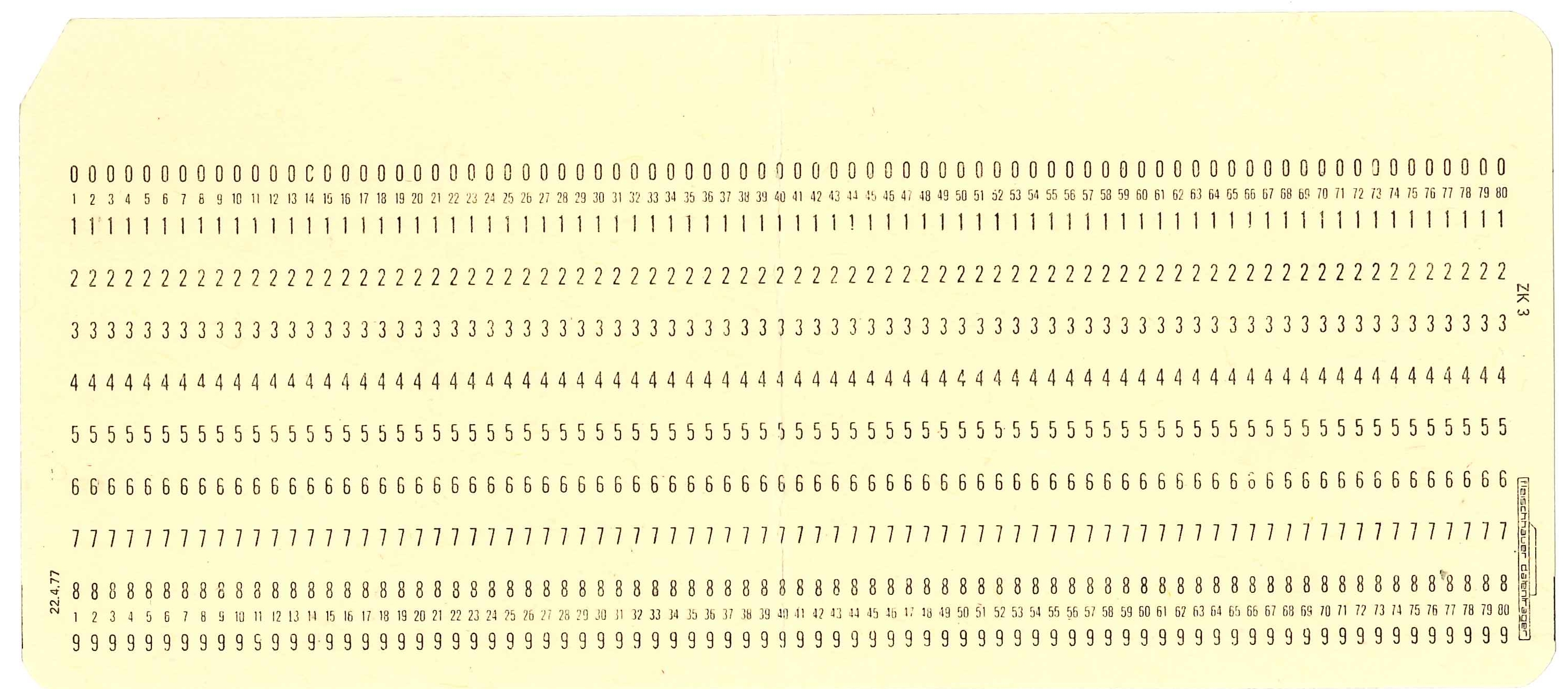 Lochkarte der Firma Fleischhauer